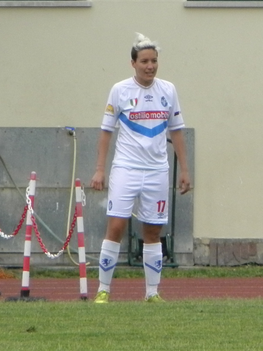 Abano Terme, 23 maggio 2015, finale di Coppa Italia di calcio femminile 2014-2015. Brescia, l'attaccante Stefania Tarenzi (17) rileva il centrocampista Daniela Sabatino (9) al 68'.